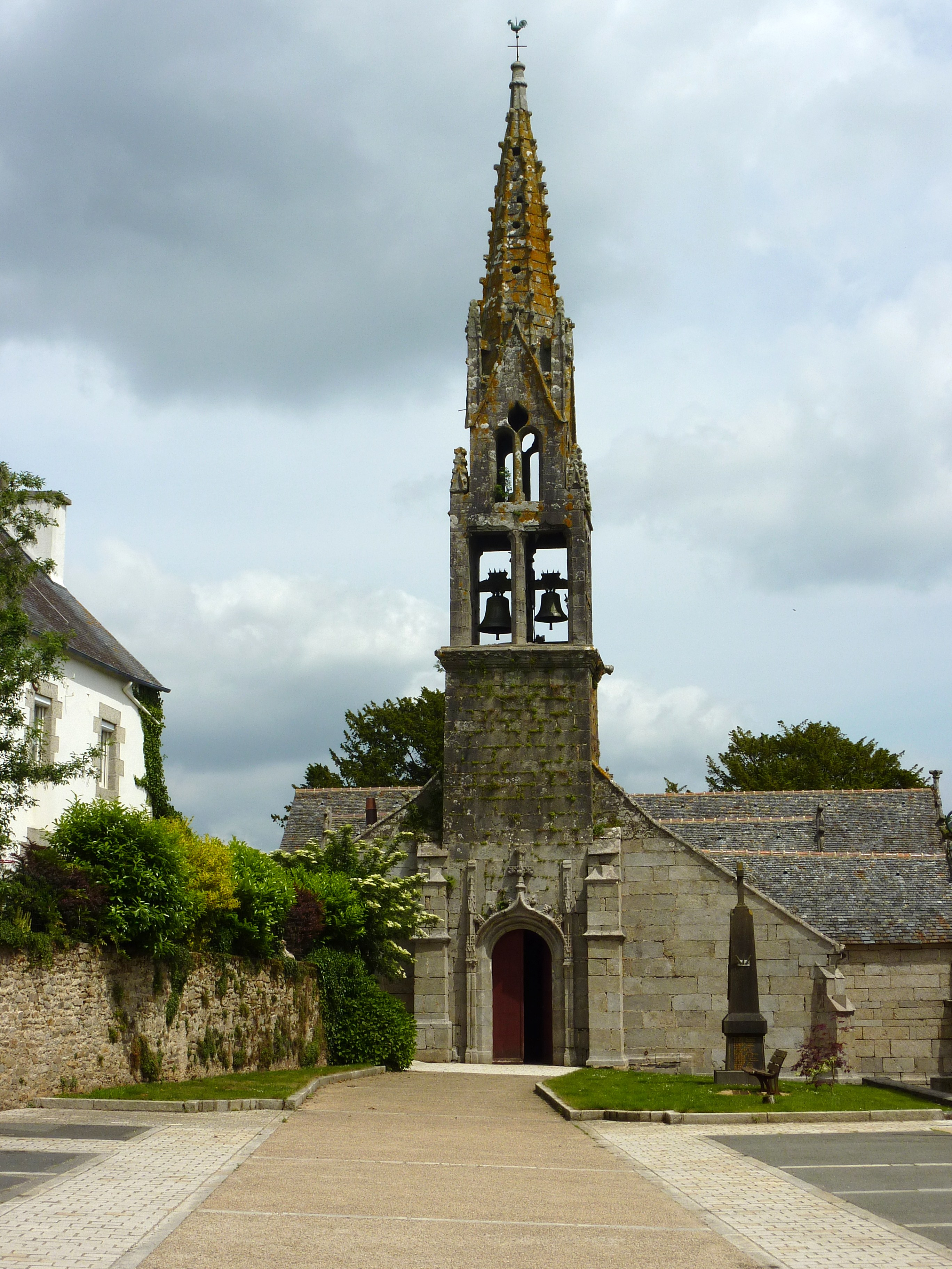 Loqueffret: l'église Sainte-Geneviève vue de la place de la mairie